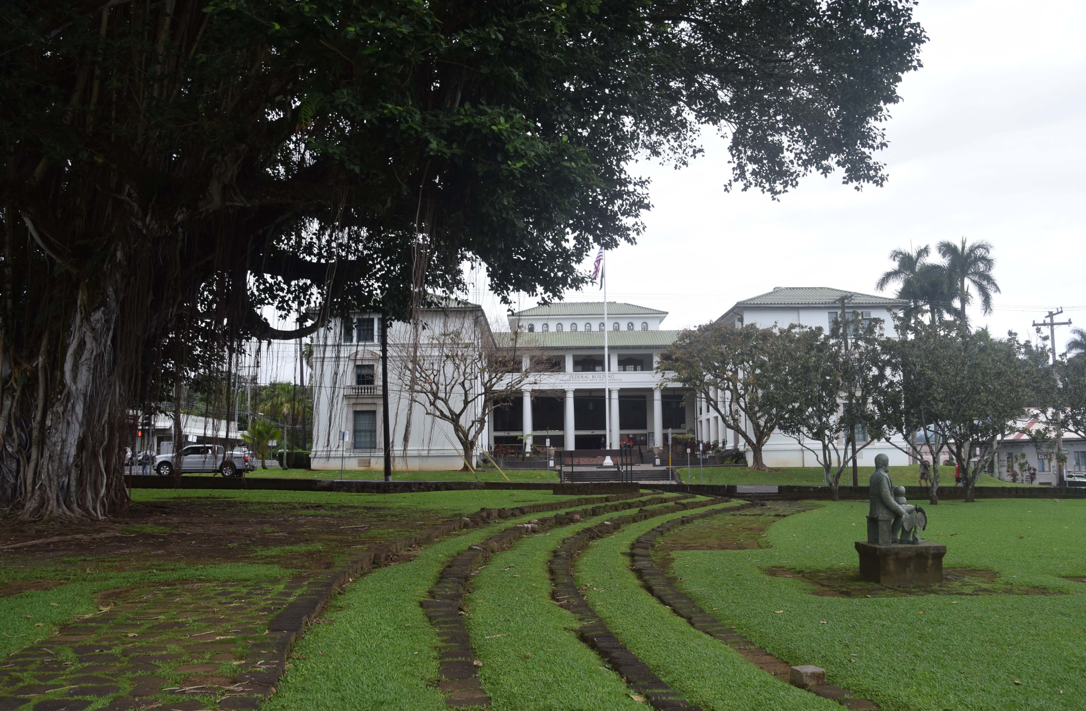 Kalakaua Park, Hilo, Hawaii, view of U.S. Post Office across Waianuenue Ave.